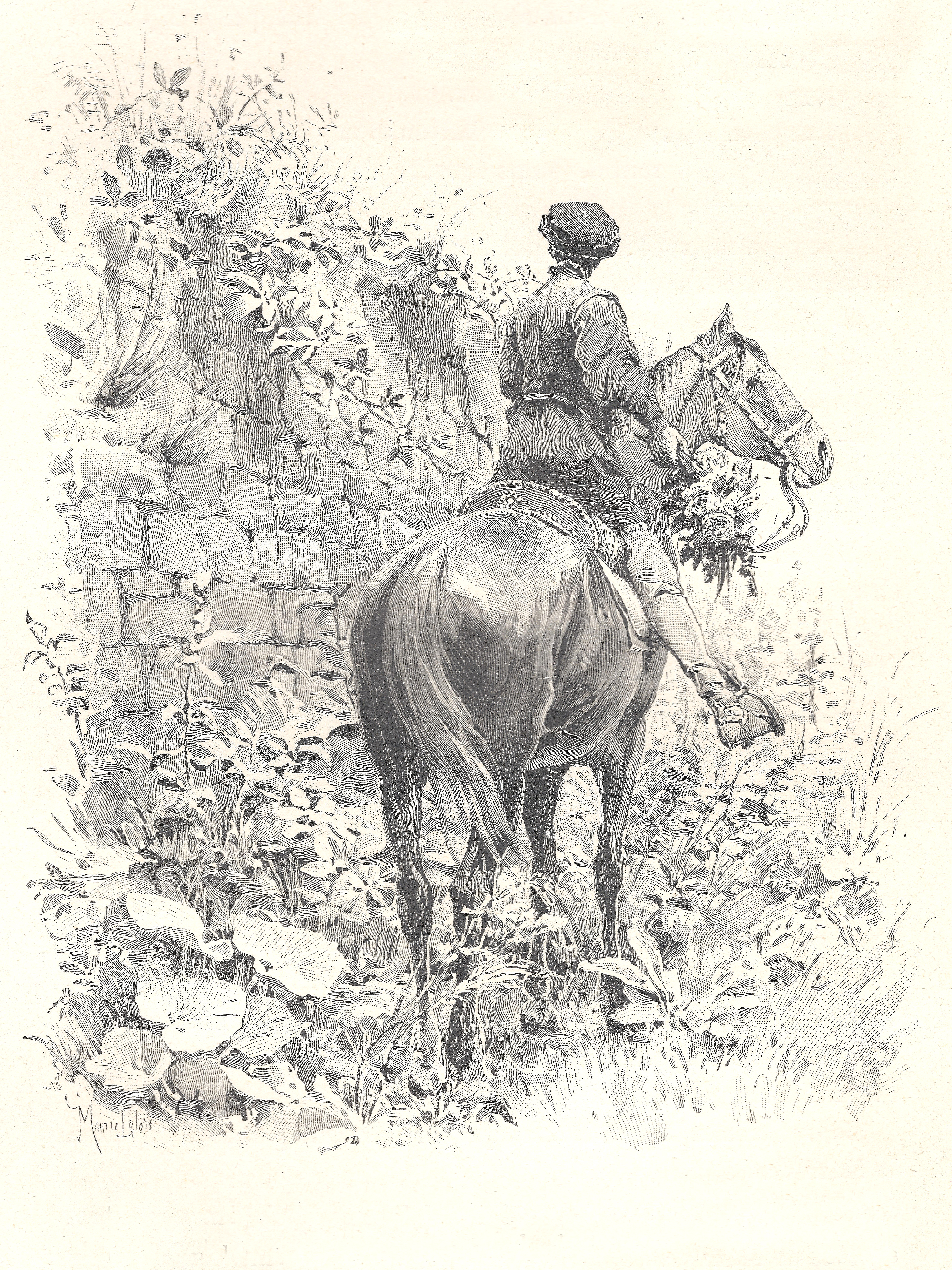 composition de Maurice Leloir et gravure sur bois de Jules Huyot se trouvant p.148 : Il lança le bouquet par dessus le mur.